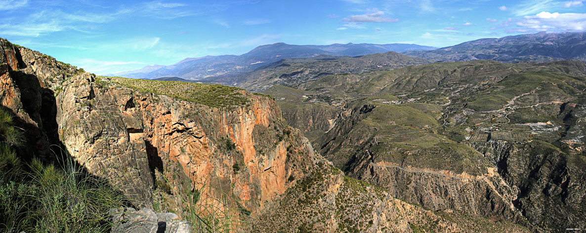 Paisaje desde los Tajos de Cejor donde se puede ver el territorio del desaparecido pueblo de Benínar (Almería)